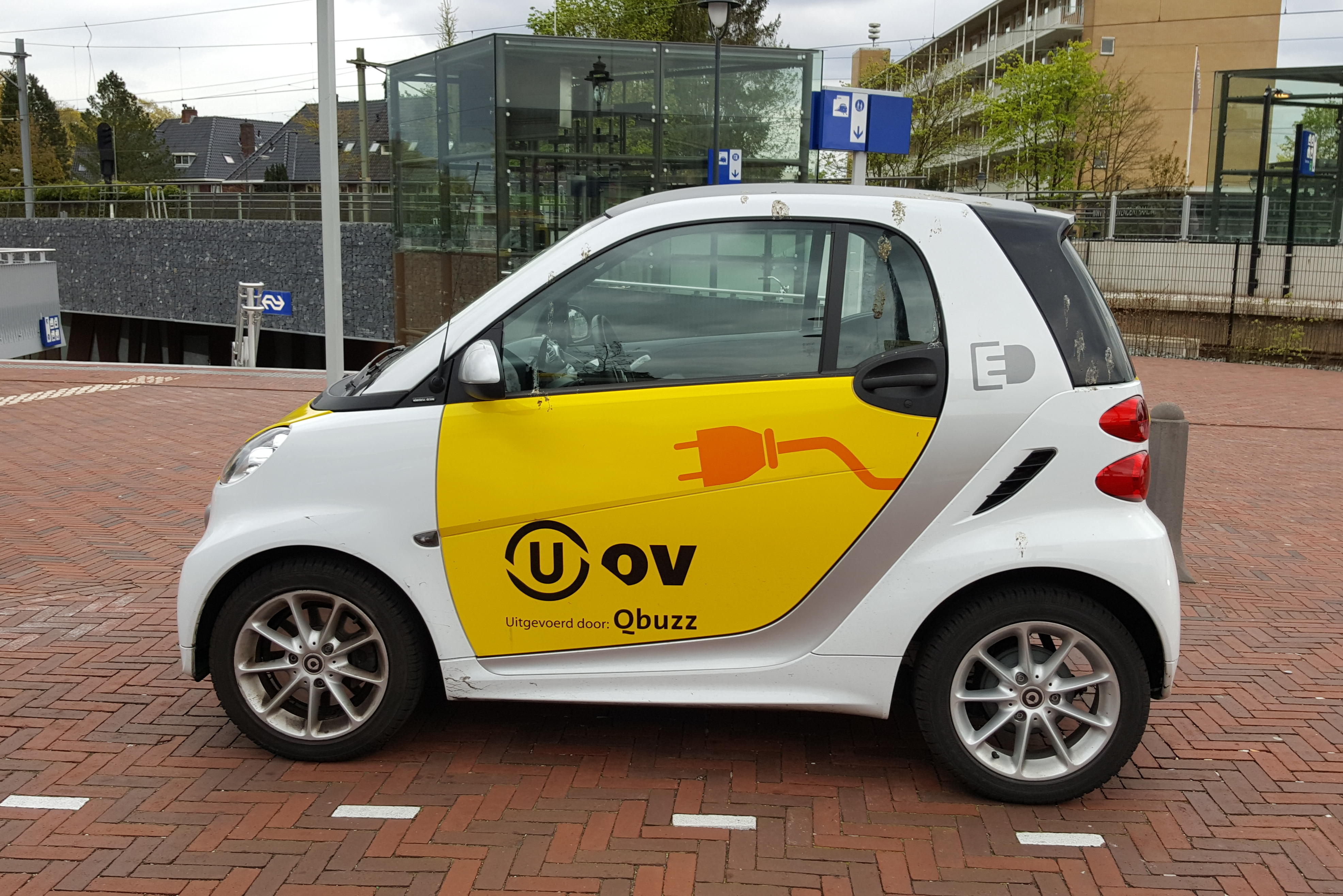 Smart Electric Drive, 1 May 2017 used by U-OV Netherlands.